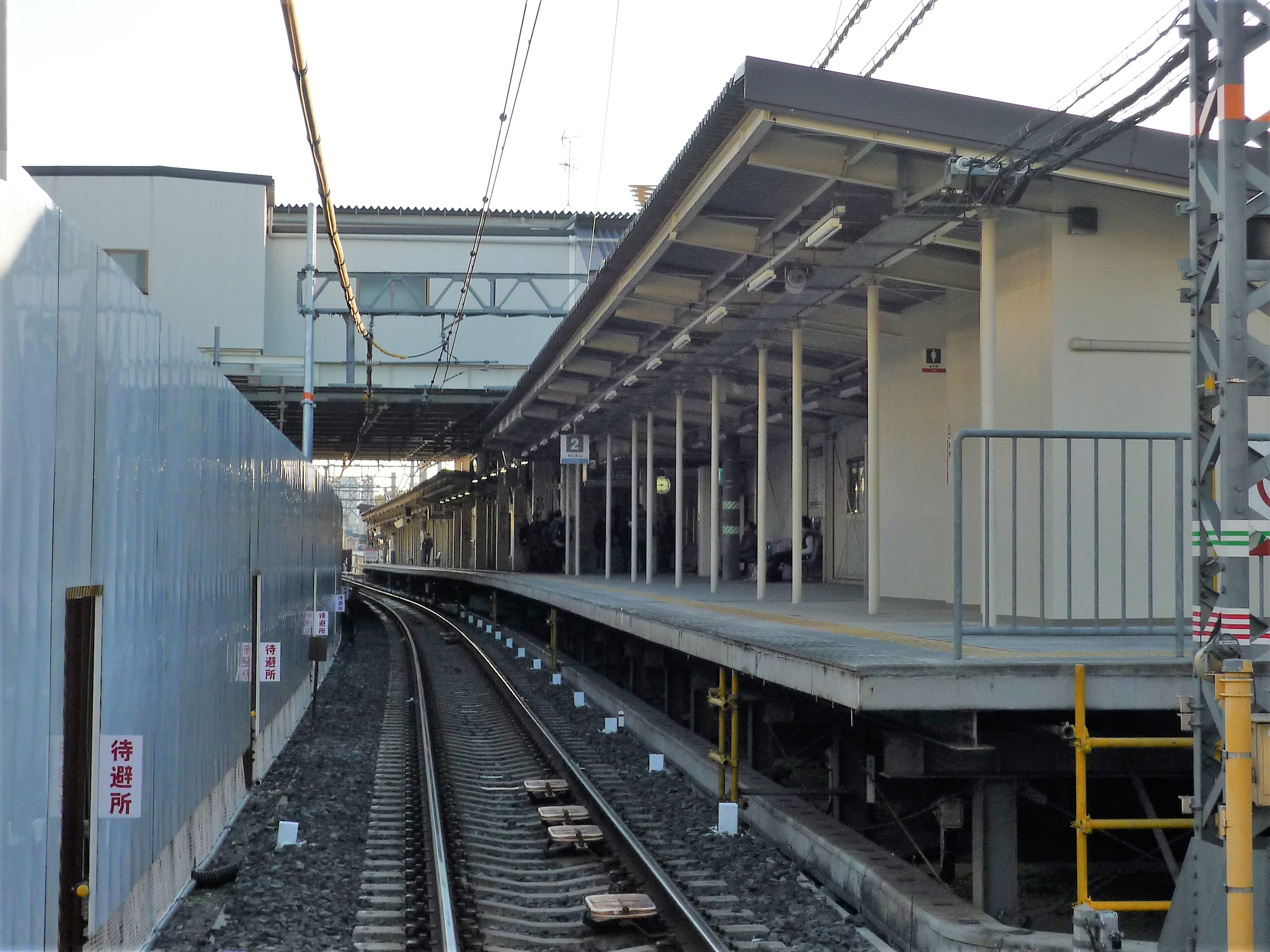 高架化工事中の羽衣駅（地上駅の2番線、2016年12月撮影）